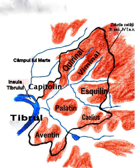 Schiță a localizării celor șapte coline ale Romei. Textul original în germană a fost tradus în limba română